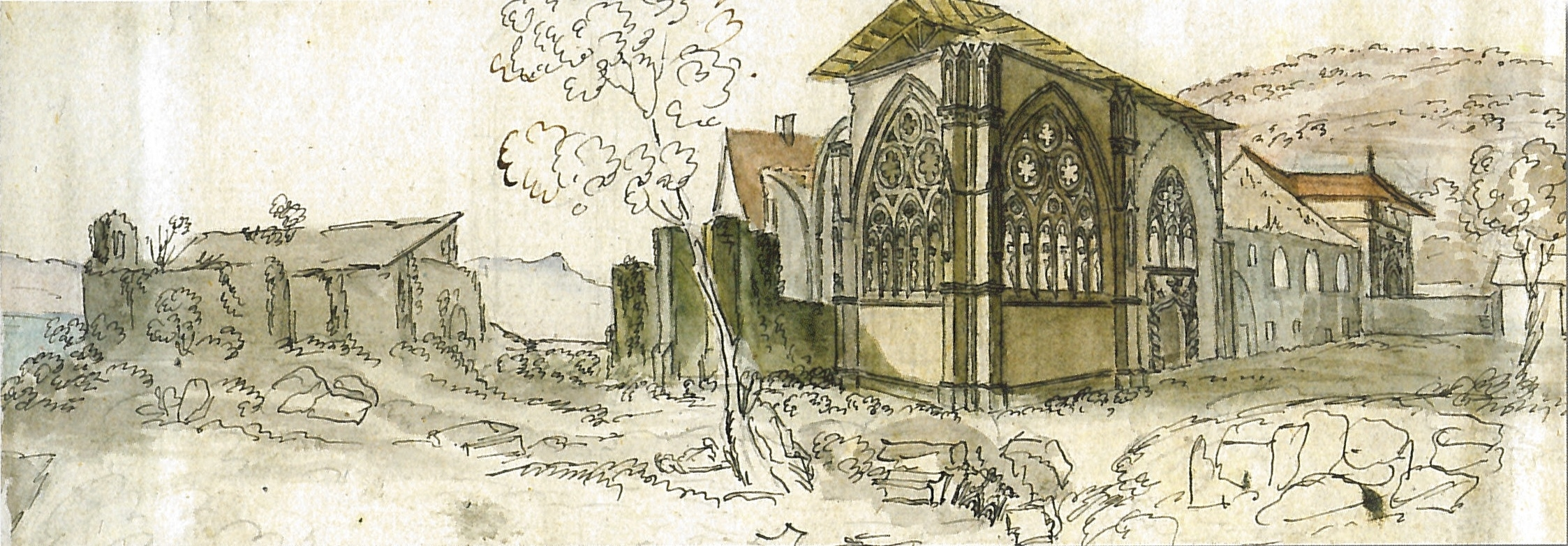 Aquarelle de Marie Despine représentant l'église abbatiale d'Hautecombe en 1824, avant sa restauration ; au premier plan, la chapelle des Princes